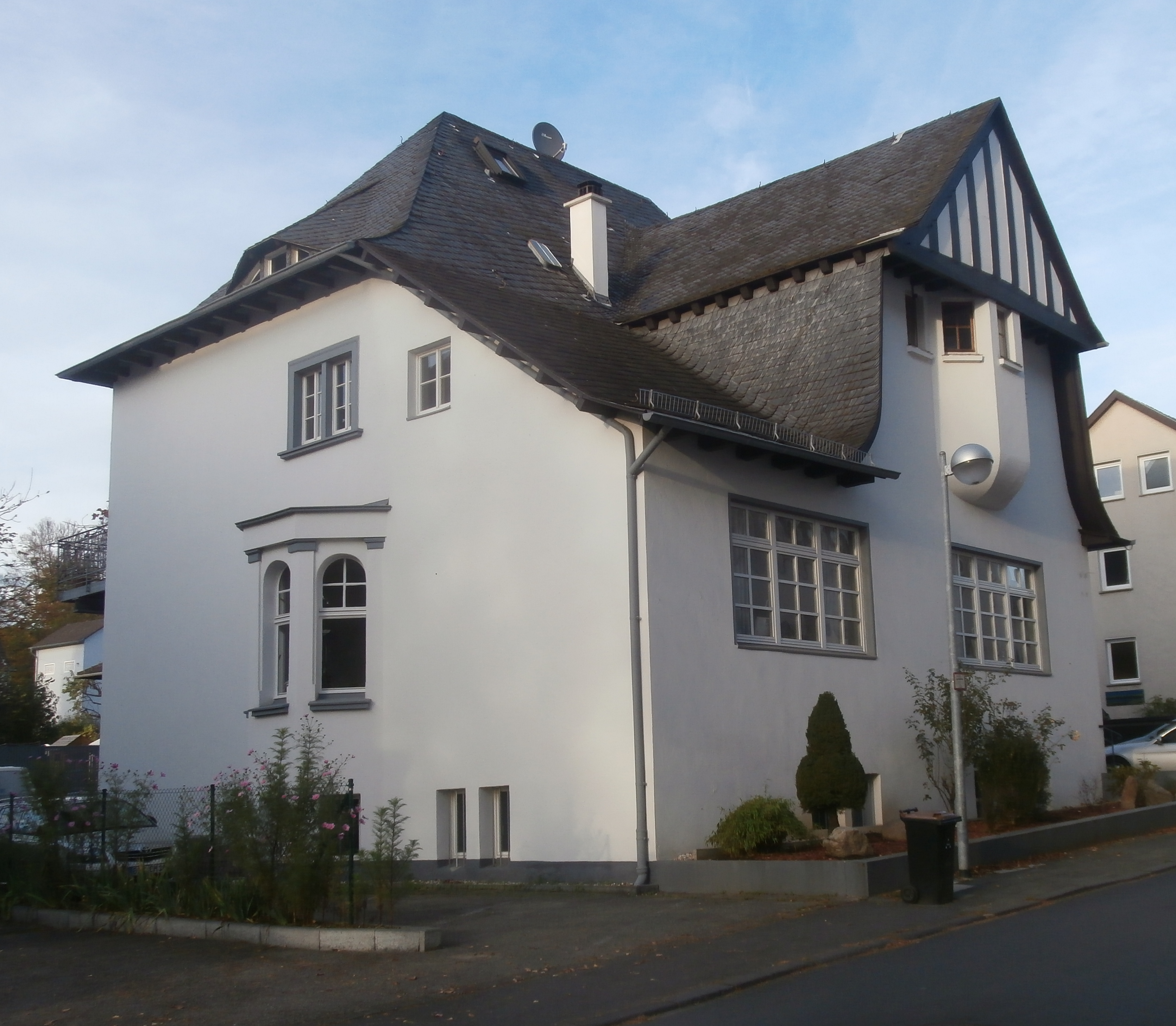 Denkmalgeschützte Villa, Bismarckstraße 47, Bad Honnef: Ansicht aus Südwesten